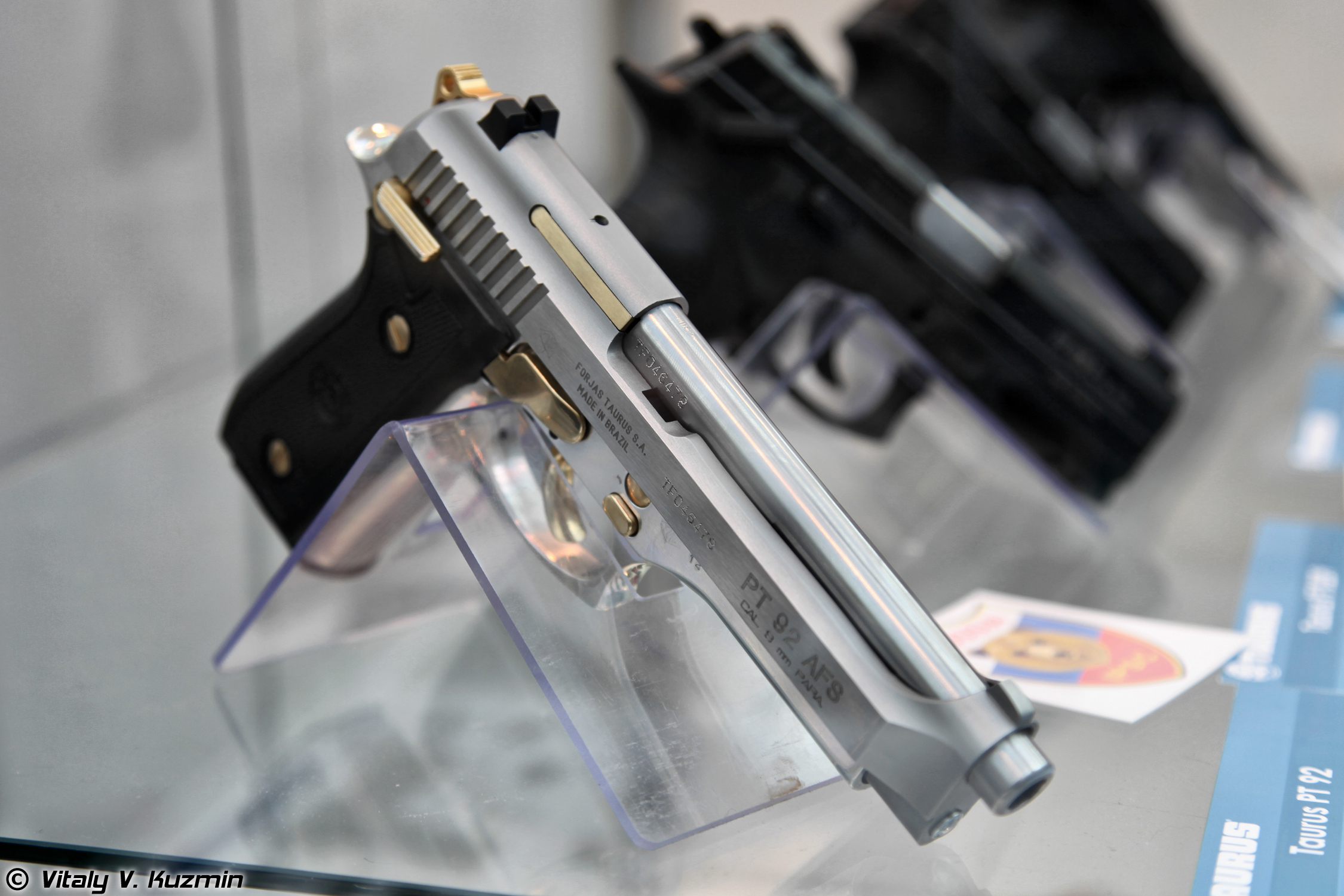 9x19 Taurus PT92